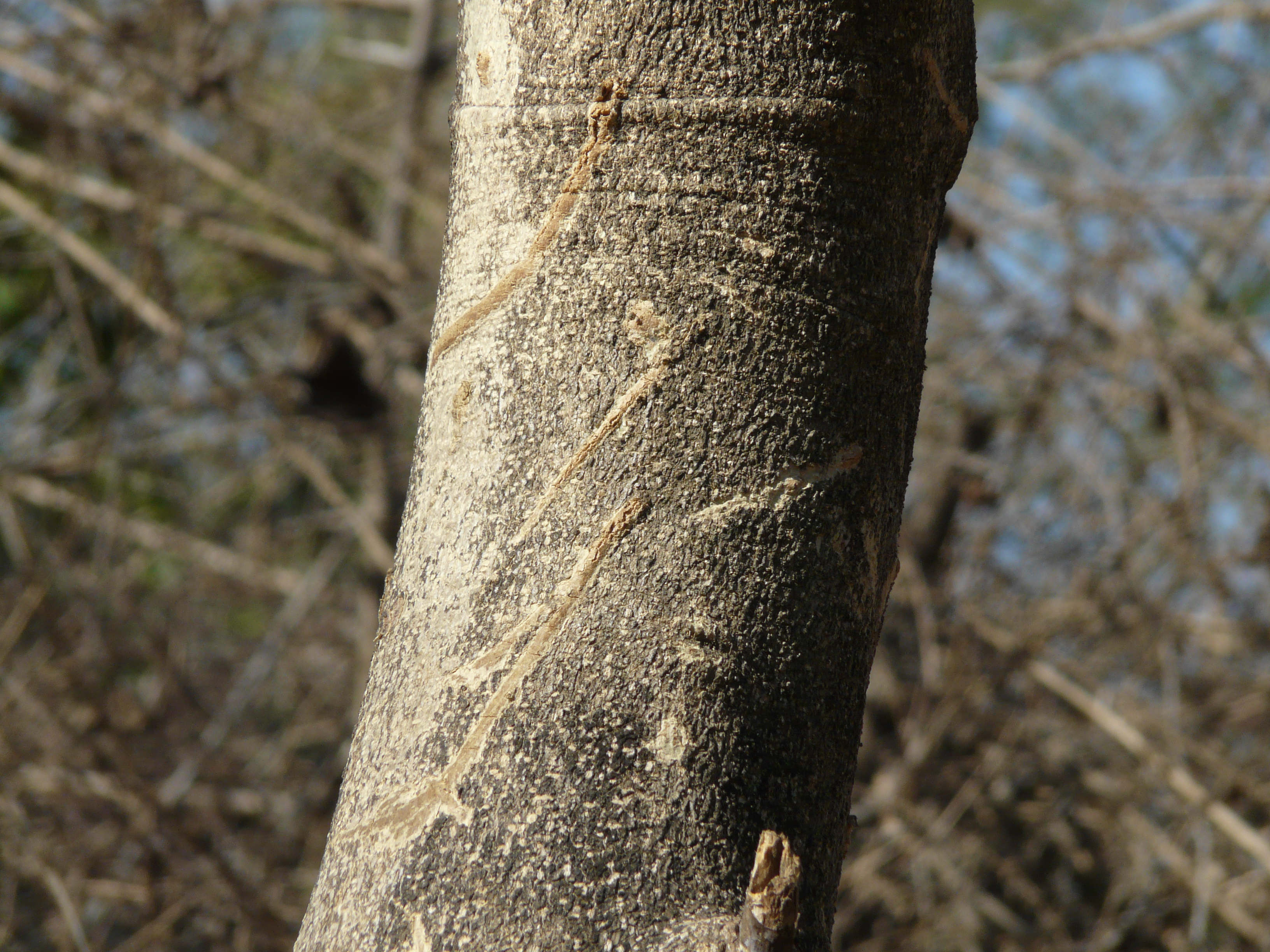 Verbenaceae (verbena, or vervain family) » Gmelina arborea g-MEL-in-uh -- named for Johann Gottlieb Gmelin, German professor and naturalist ar-BOR-ee-uh -- meaning, tree-like commonly known as: Cashmere tree, coomb teak, goomar teak, kashmir tree, Malay bush-beech, white beech, white teak • Assamese: gomari • Bengali: গামার gamar, গাম্ভারি gambhari • Gujarati: શેવન shevan • Hindi: भद्रपर्णी bhadraparni, गमहर or गम्हड़ gamhar • Kannada: ಕಾಶ್ಮೀರಿ ಮರ kaashmiri mara, ಶಿವನಿಮರ shivanimara • Khasi: dieng lophiang • Konkani: शिवन shivan, सीनी sini • Malayalam: കുമിഴ് kumizh, കുമ്പിള്‍ kumpil • Manipuri: ৱাঙ wang • Marathi: शिवन or शिवण shivan, थोरशिवणी thorshivani • Mizo: thlanvawng • Naga: imbeh ching • Nepalese: कामरी kamari • Oriya: bhodropornni, butalo, thlanvawng • Punjabi: ਫਕਡ਼ਾ phakra • Sanskrit: गम्भारी gambhari, सिन्धुपर्णी sindhuparni, सिन्धुवेषणम् sindhuveshanam, स्तूलत्वचा stulatvacha • Tamil: குமுதை kumutai, கூம்பல் kumpal, பெருங்குமிழ் peru-n-kumil • Telugu: పెద్ద గుముడు టేకు pedda gumudu teku Native to: s. China, Indian sub-continent, Indo-China, Malesia, Philippines References: Flowers of India • Wikipedia • NPGS • PIER species info • ENVIS • eFlora